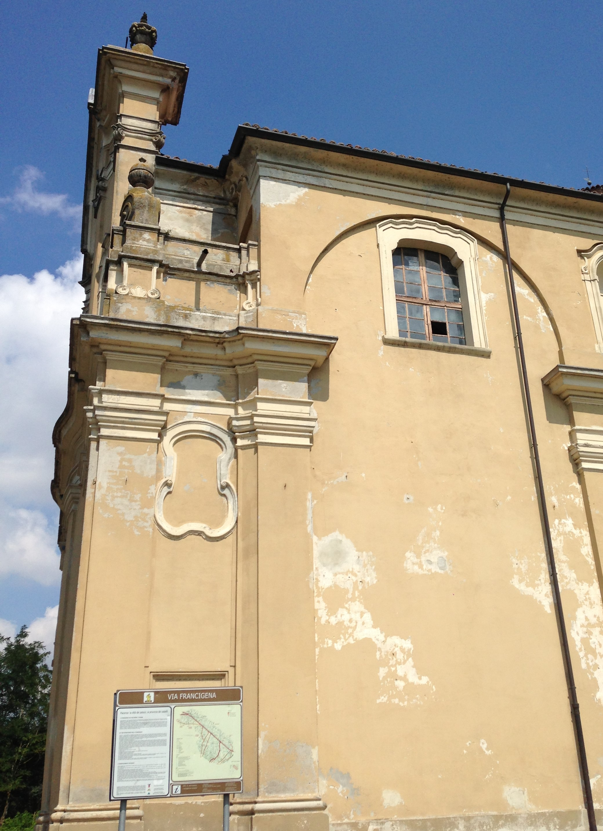 Iglesia en Paderna